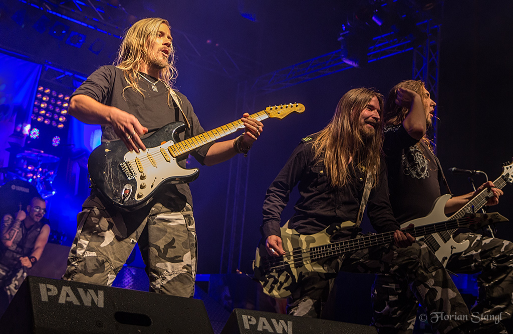 Sabaton 21.9.2012 Geiselwind, Eventhalle